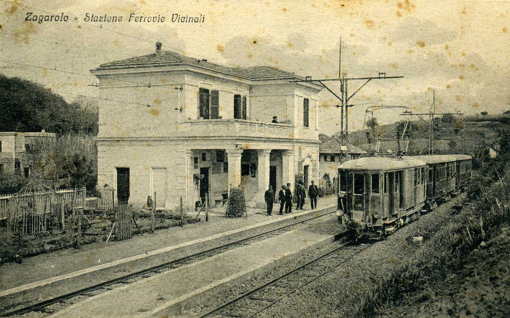 Cartolina postale del 1927 della Stazione Vicinale di Zagarolo Paese (RM)